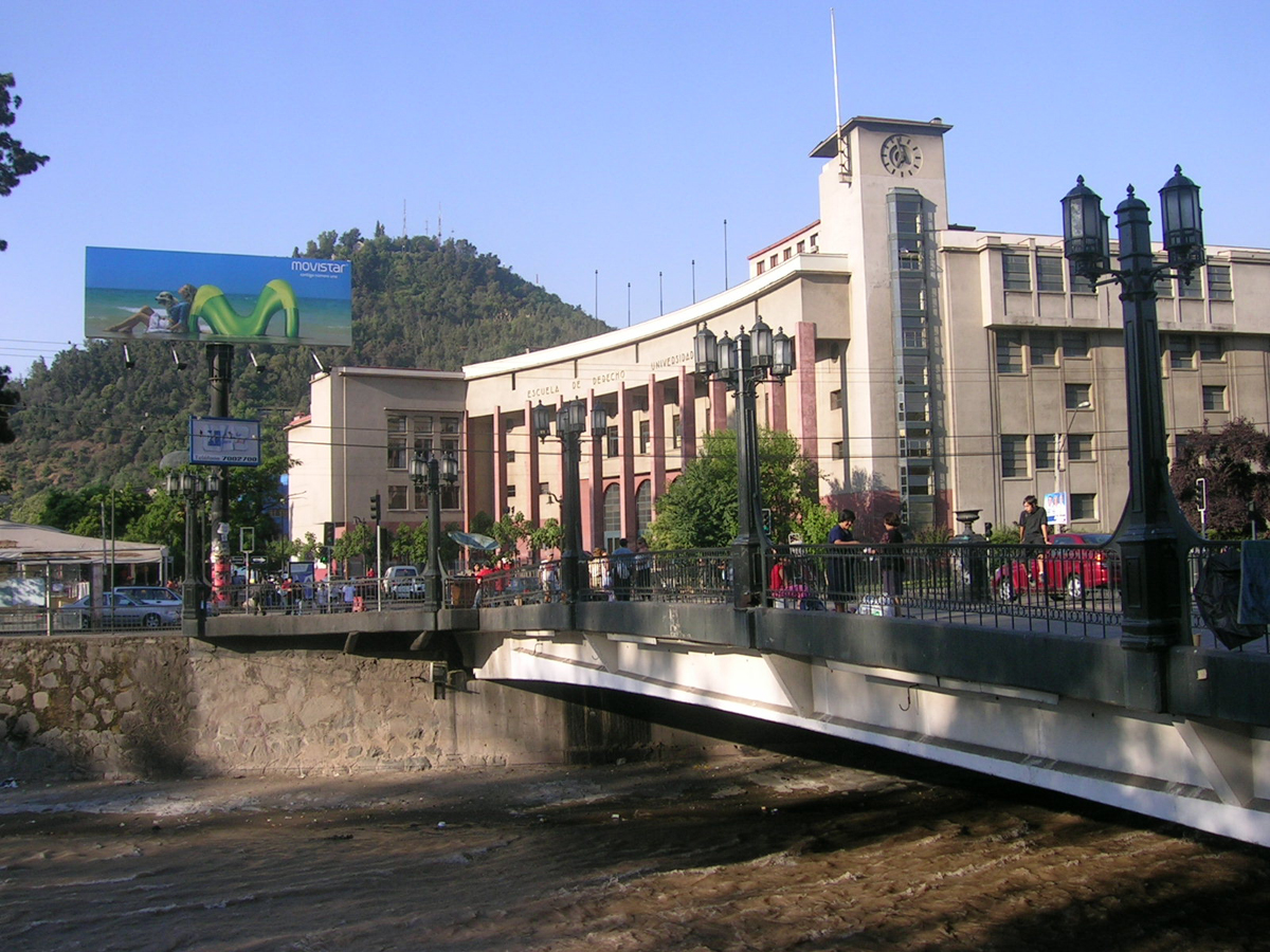 Puente Pío Nono, con la Facultad de Derecho de la Universidad de Chile de fondo.